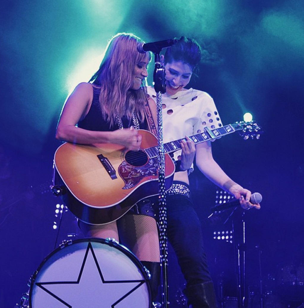 Hanna (izquierda), Ashley (derecha)